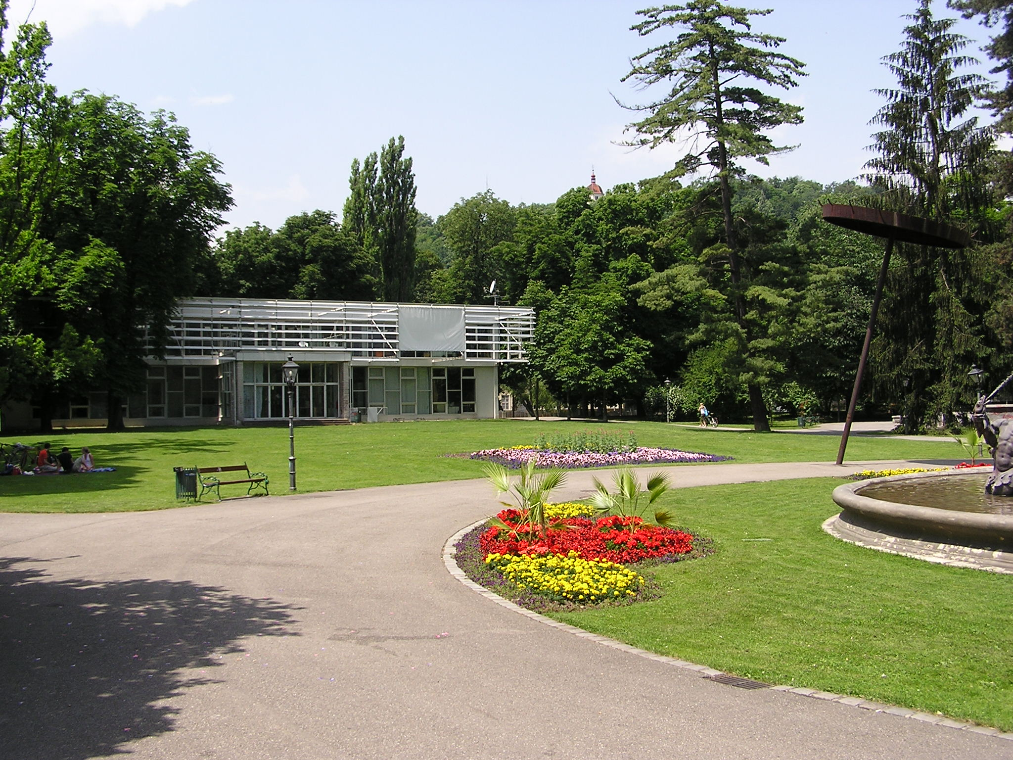 Forum Stadtpark